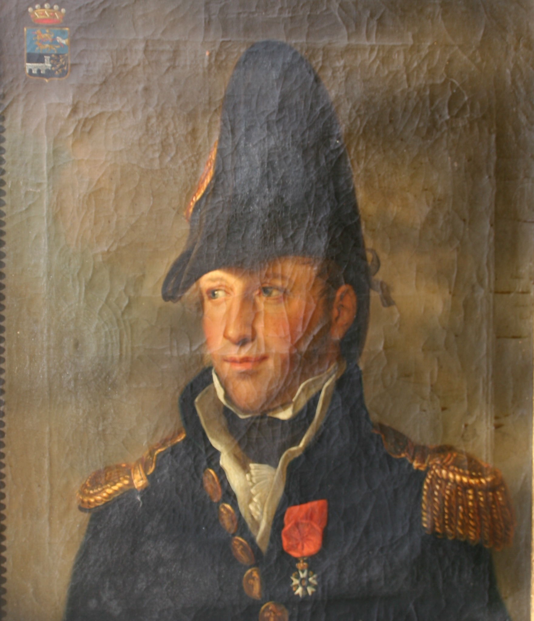 Portrait daté de 1808